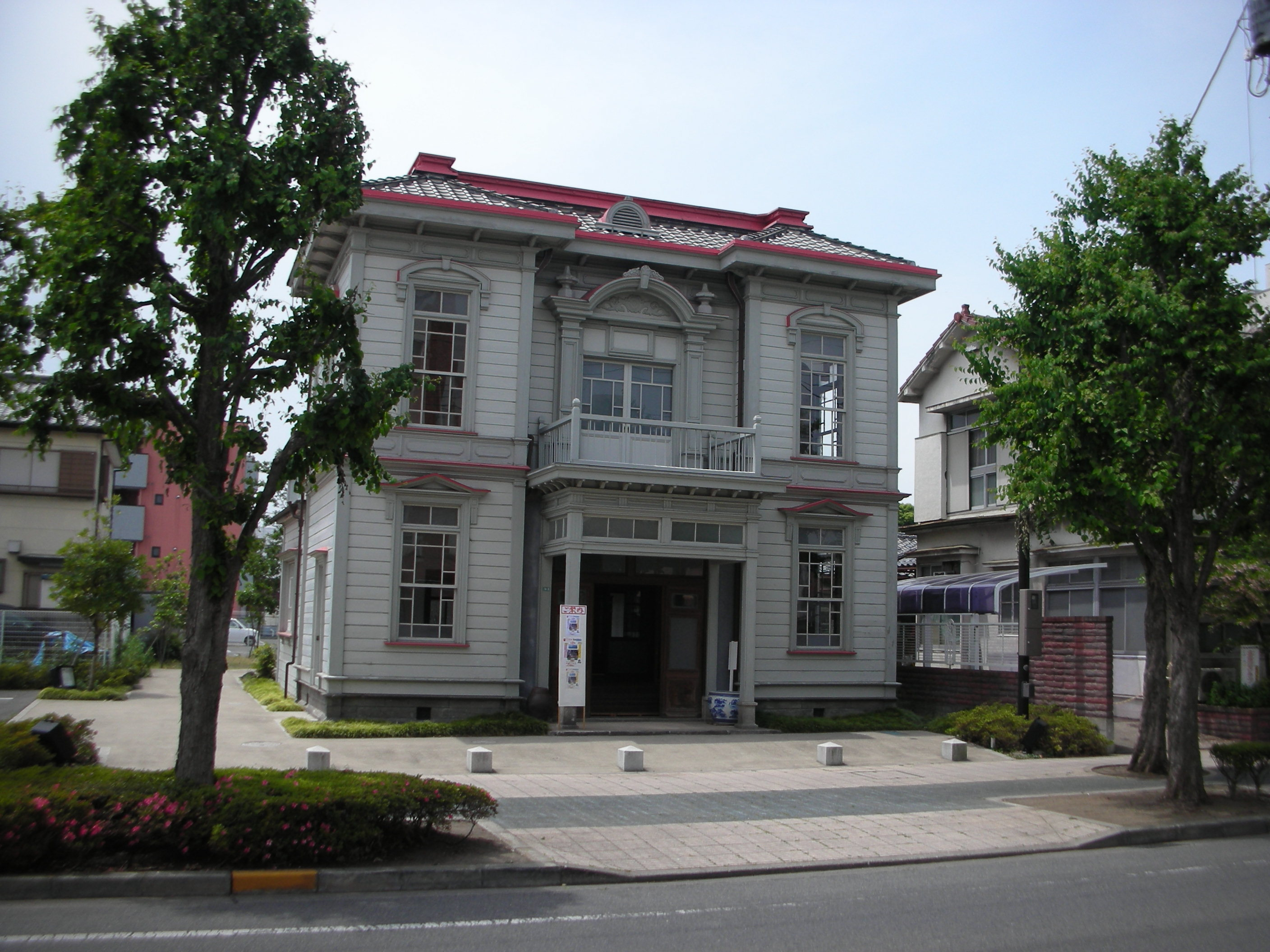 いせさき明治館（黒羽根内科医院旧館）の外観